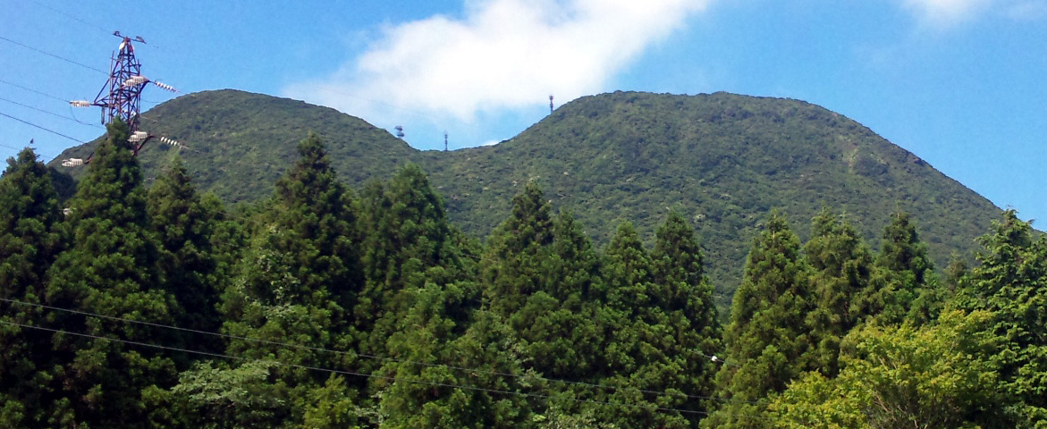 上二子山を南南西から望む。元箱根側から。